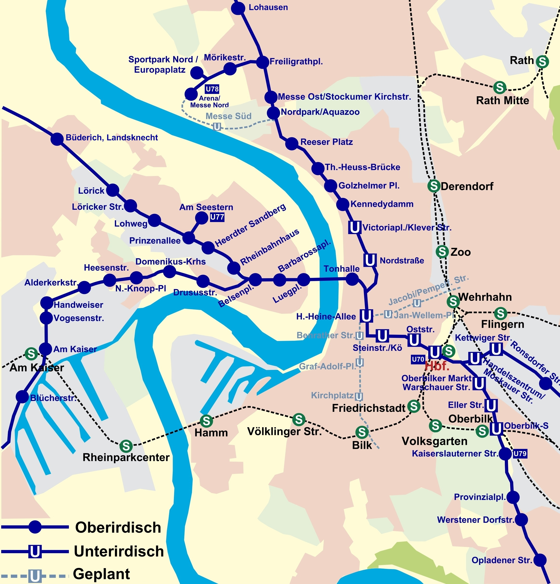 Stadtbahnplan von Düsseldorf